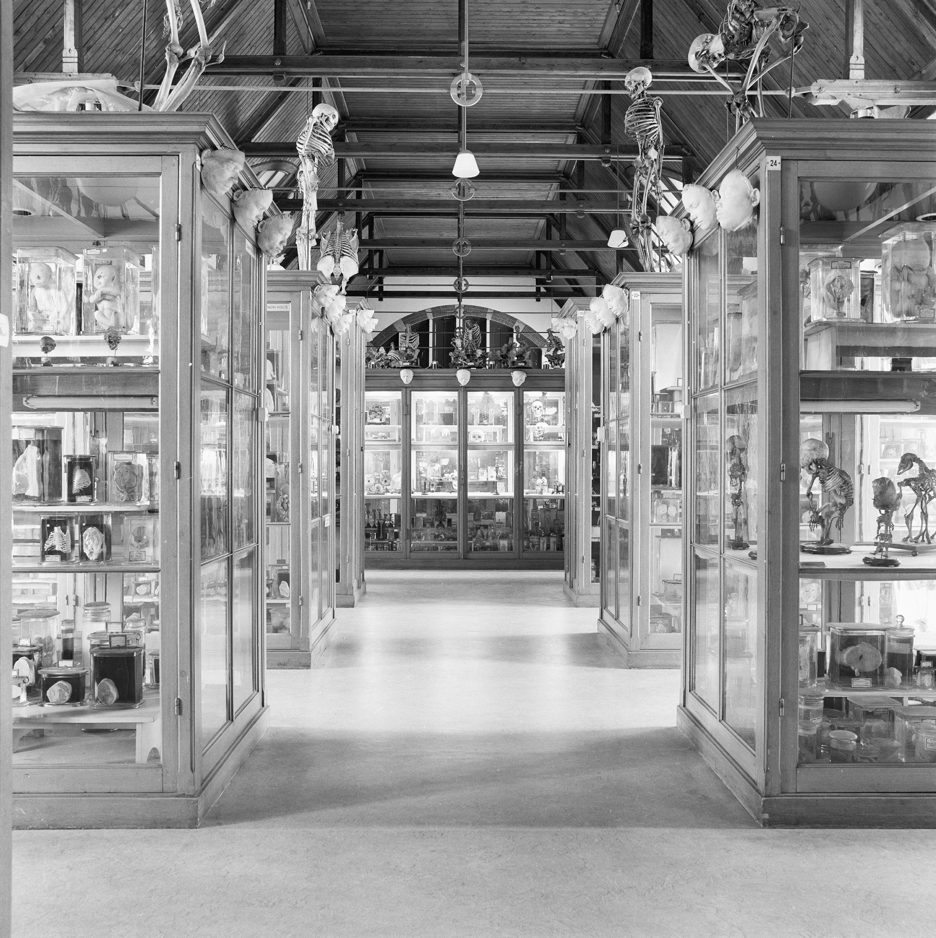 Ontleedkundig Lab.: interieur zolder